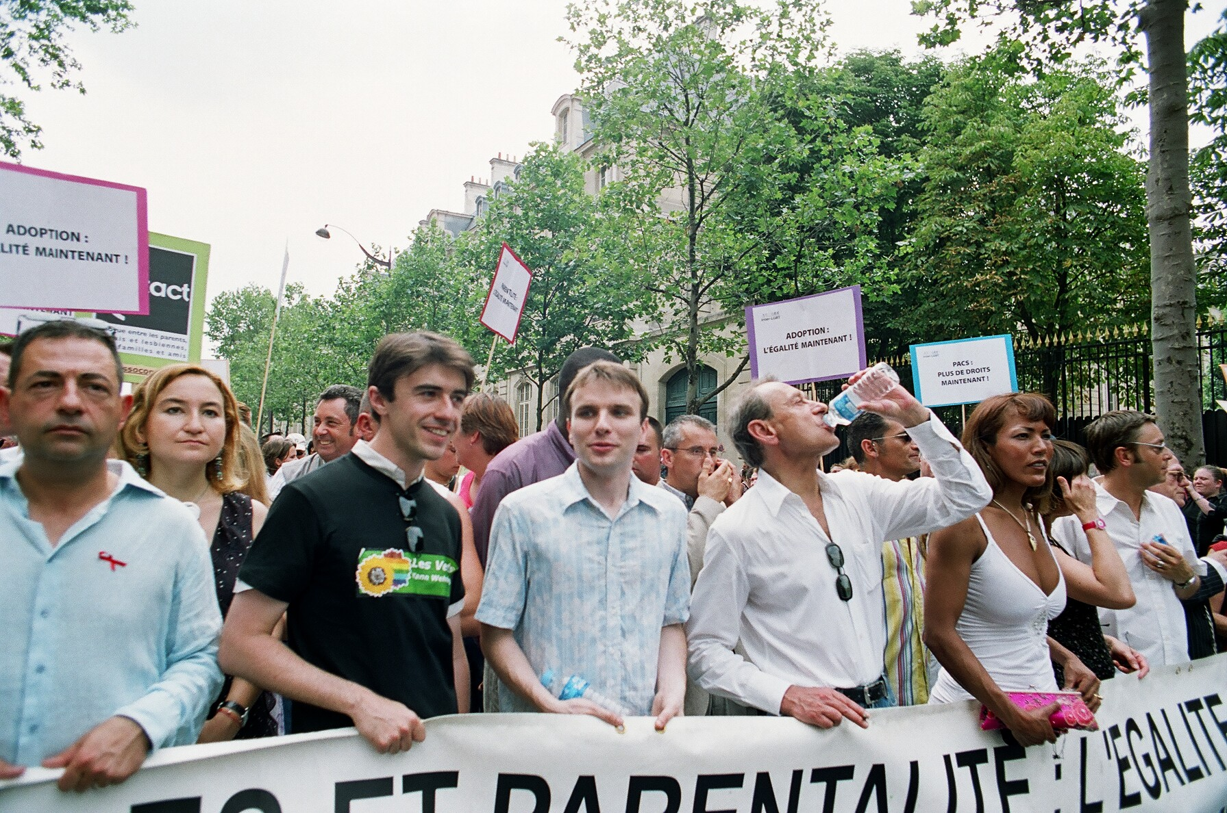 Défilé de la Gay Pride à Paris, juin 2005